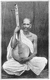 "Indische muzikant uit Pondichéry"